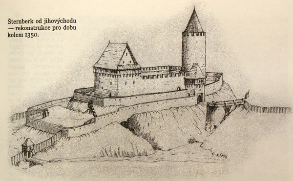 Hrad Šternberk - rekonstrukce pro dobu kolem 1350